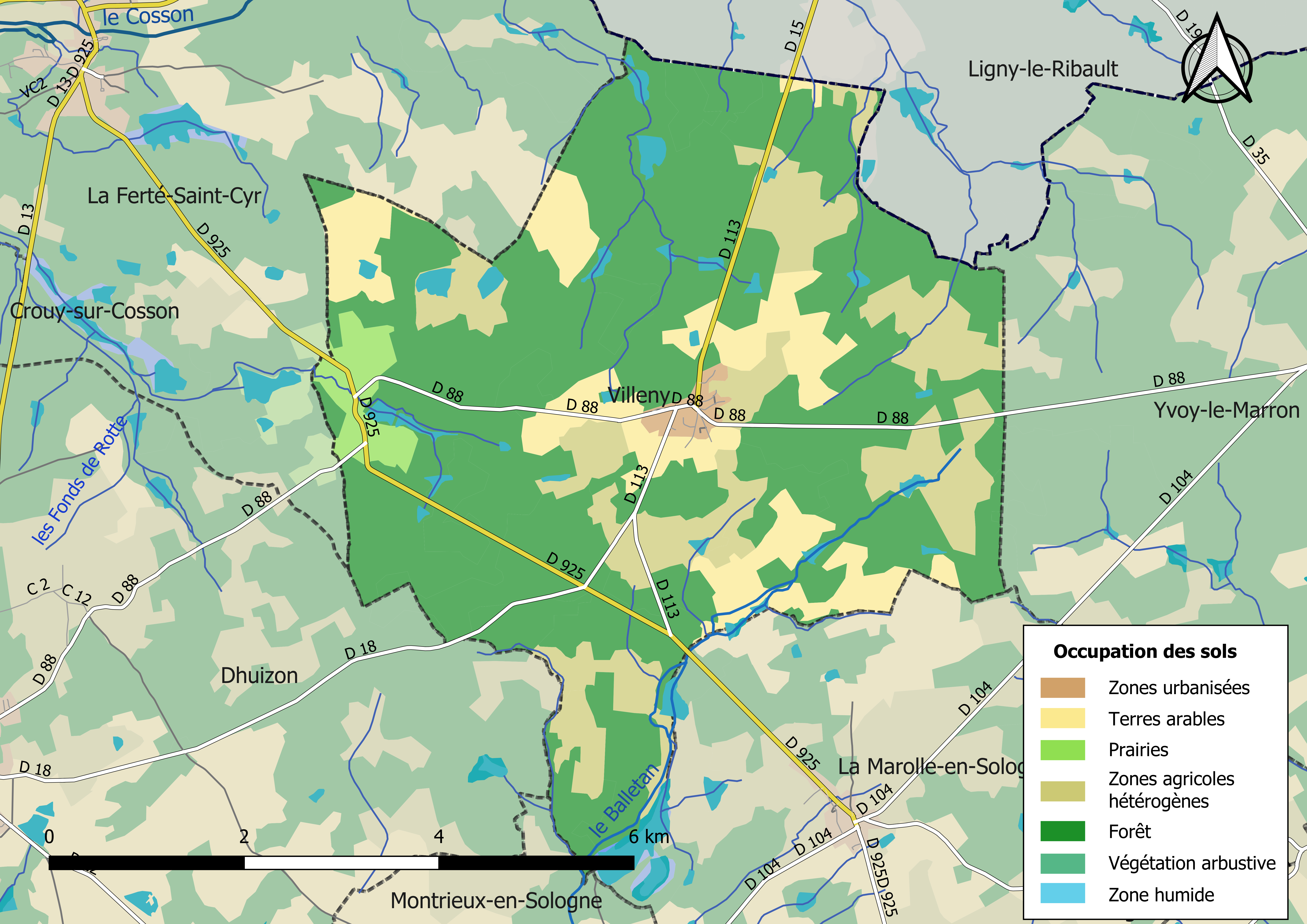 Carte des infrastructures et de l’occupation des sols en 2018 de la commune de Villeny (France).